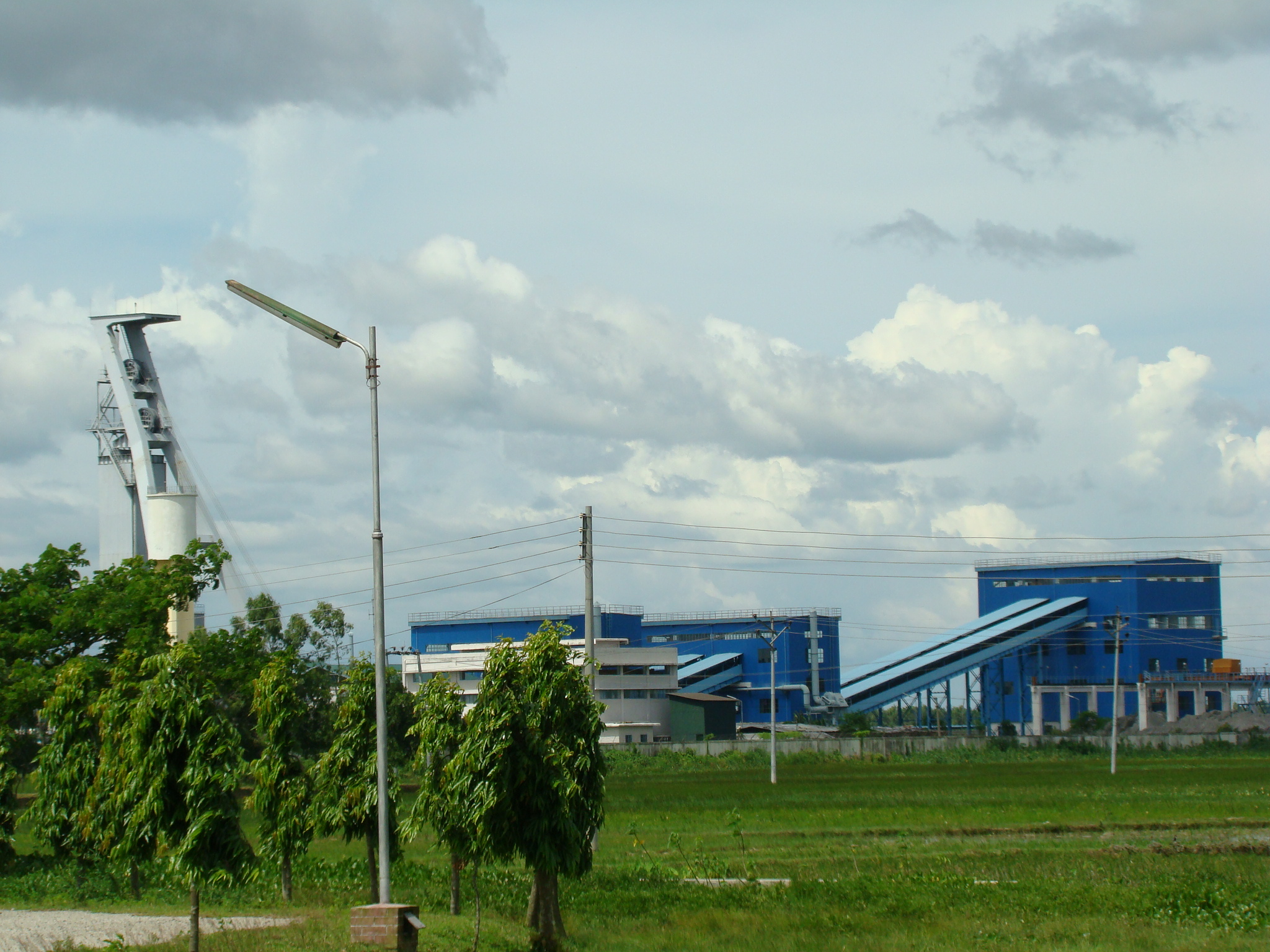 Maddhapara Granite Mine Dinajpur Bangladesh